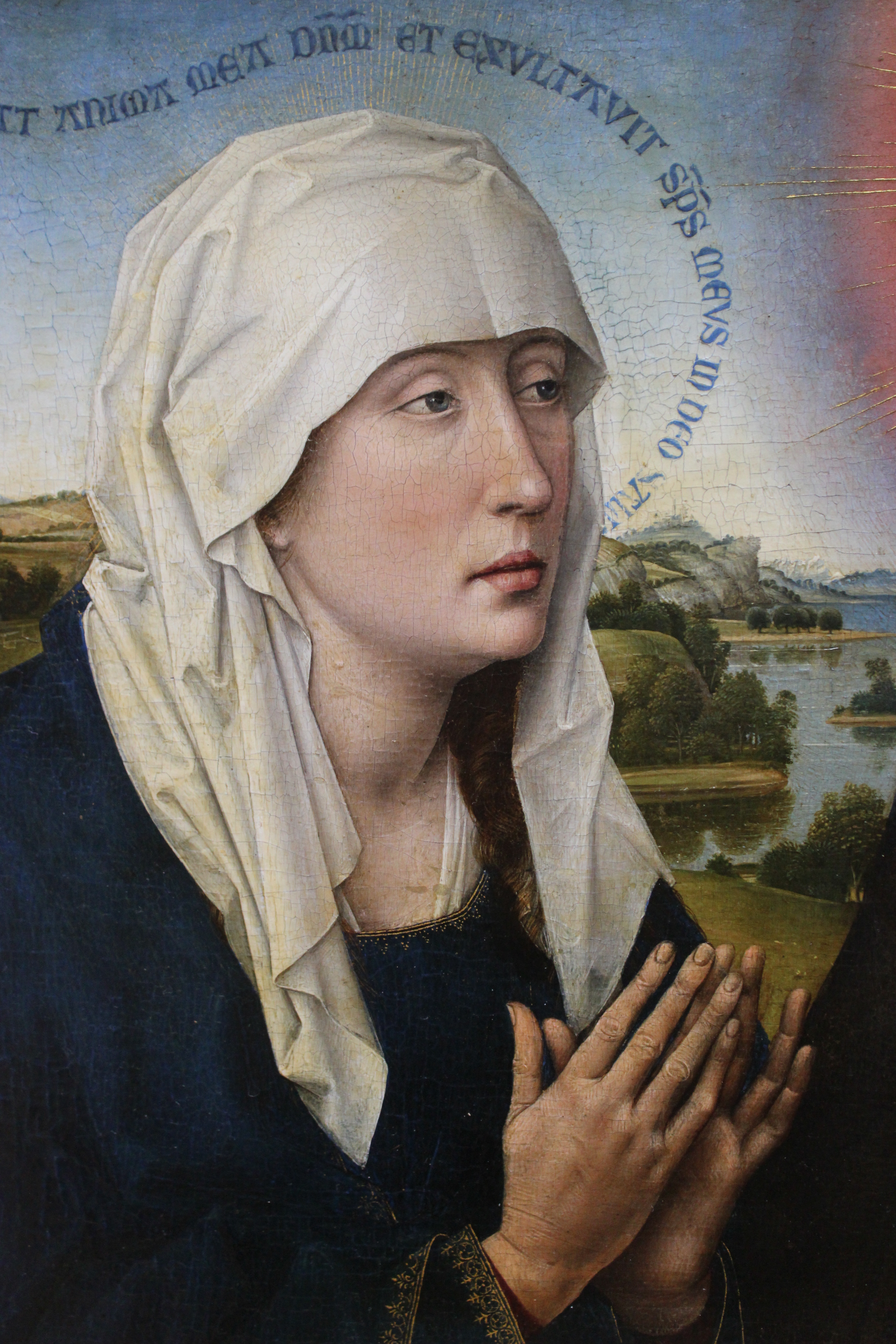 Museo del Louvre, Tríptico Braque. Rogier van der Weyden. La Virgen.